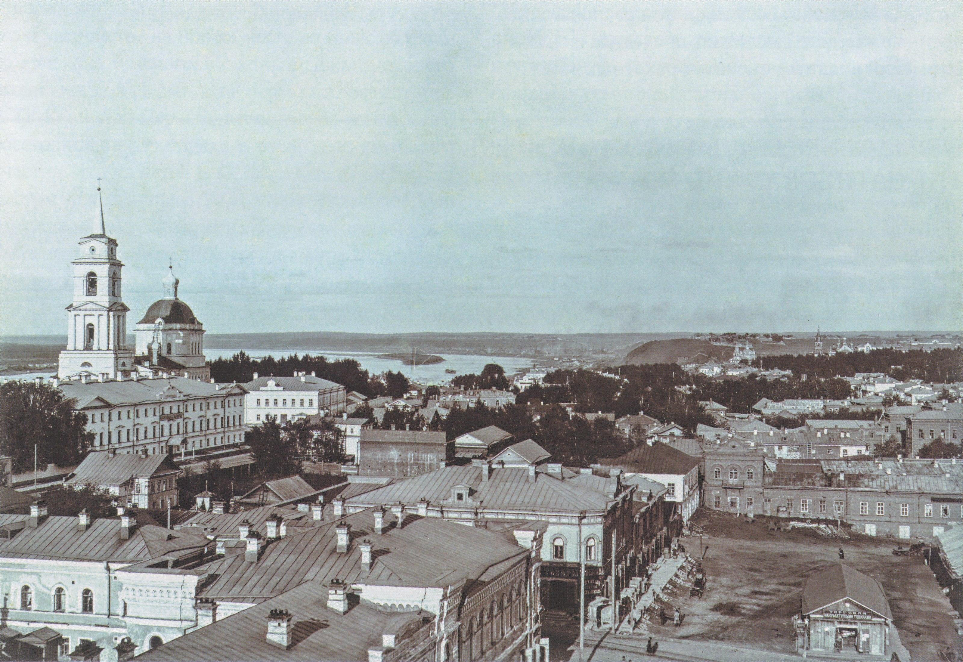 Панорама Перми с пожарной каланчи